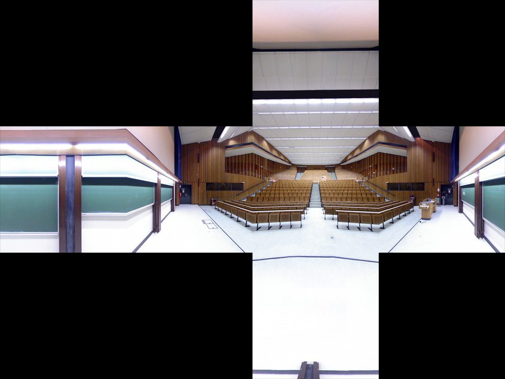 Panorama des Auditorium Maximum (Audi Max) der TU Wien (kubische Darstellung)